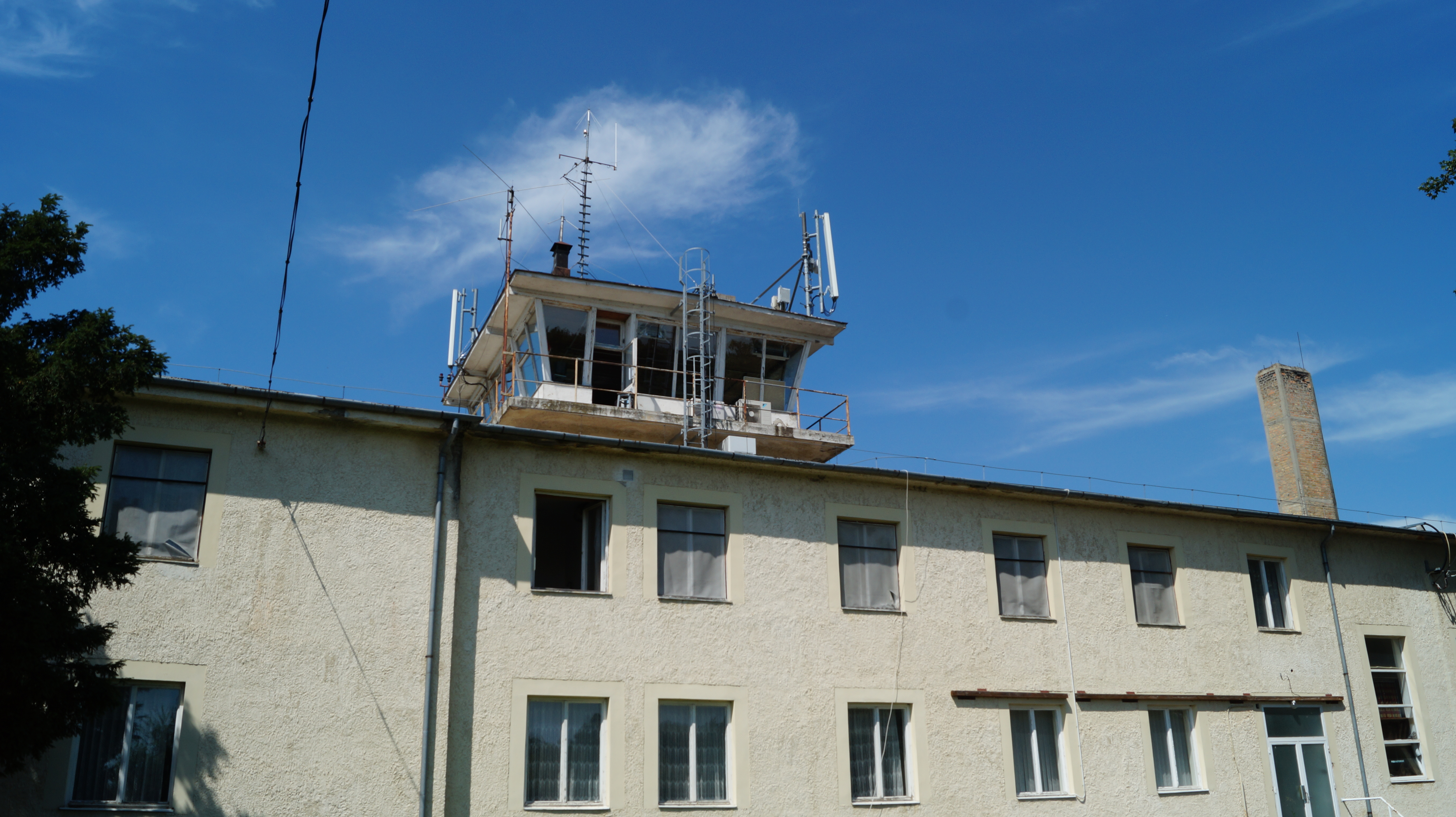 Der Kontrollturm des Flughafens in Sármellék